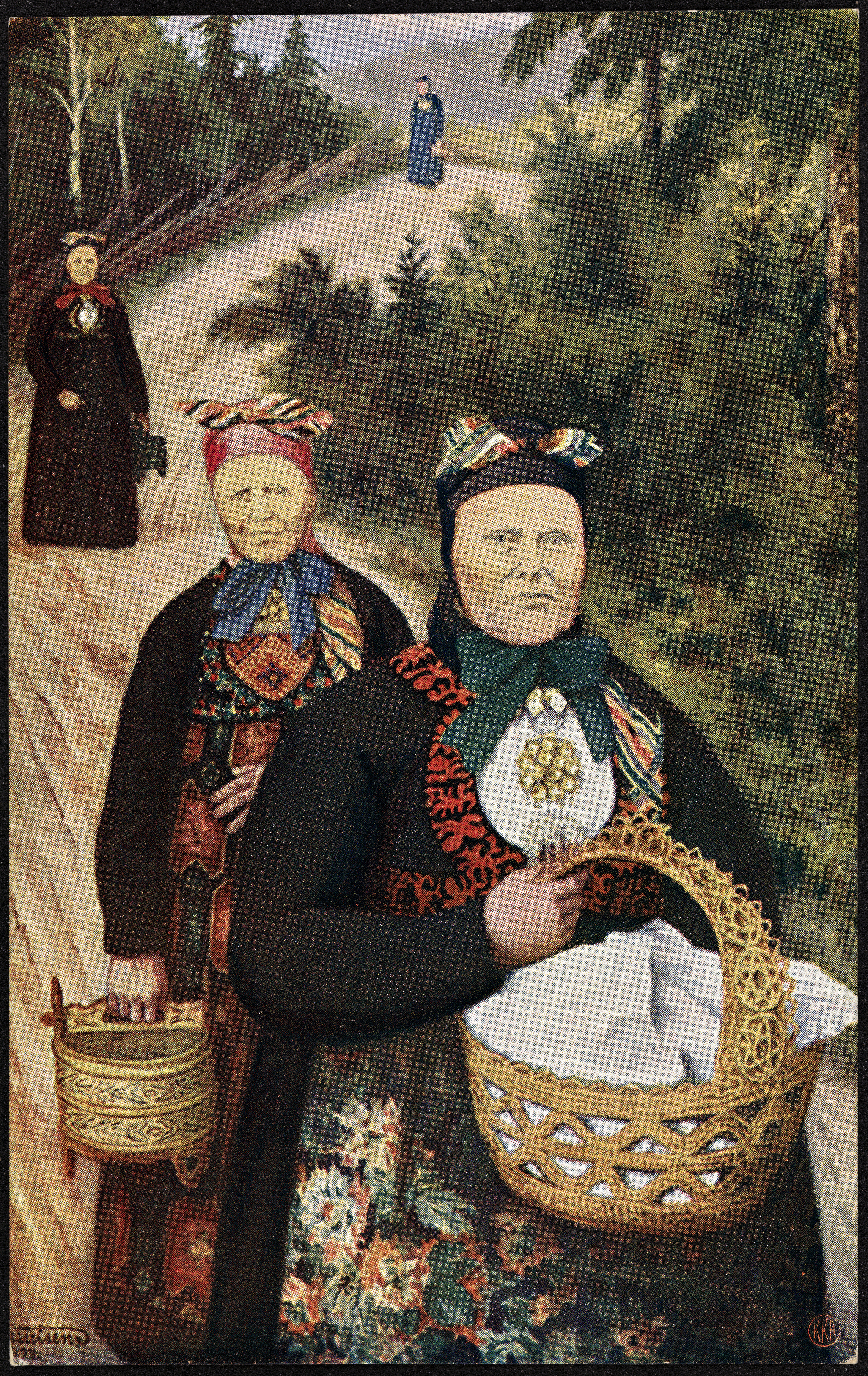 Beskrivelse / Description: Postkort / Postcard. Dato / Date: malt 1904 Kunstner / Artist: Theodor Kittelsen (1857-1914) Utgiver / Publisher: Mittet & Co. Digital kopi av original / Digital copy of original: trykt postkort, farge Eier / Owner Institution: Nasjonalbiblioteket / National Library of Norway Lenke / Link: Bildesignatur / Image Number: blds_06507